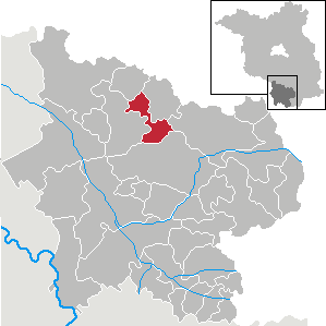 Fichtwald in Brandenburg (Country) - District Elbe-Elster